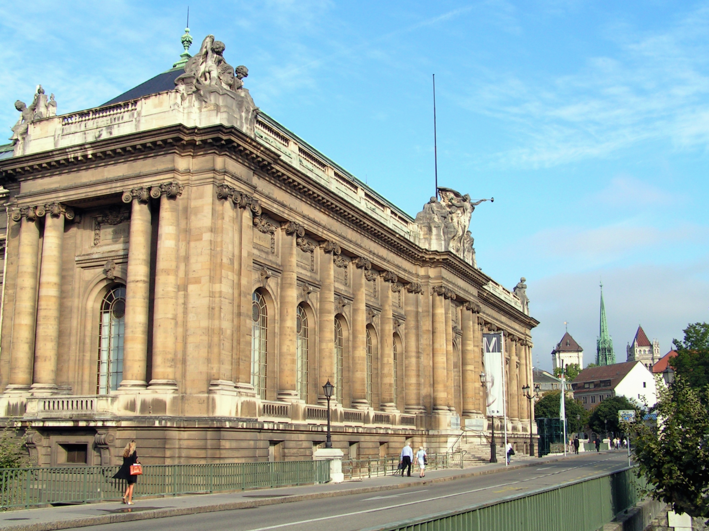 Rue Charles-Galland 2, Genève. Musée d'art et d'histoire. La façade principale.